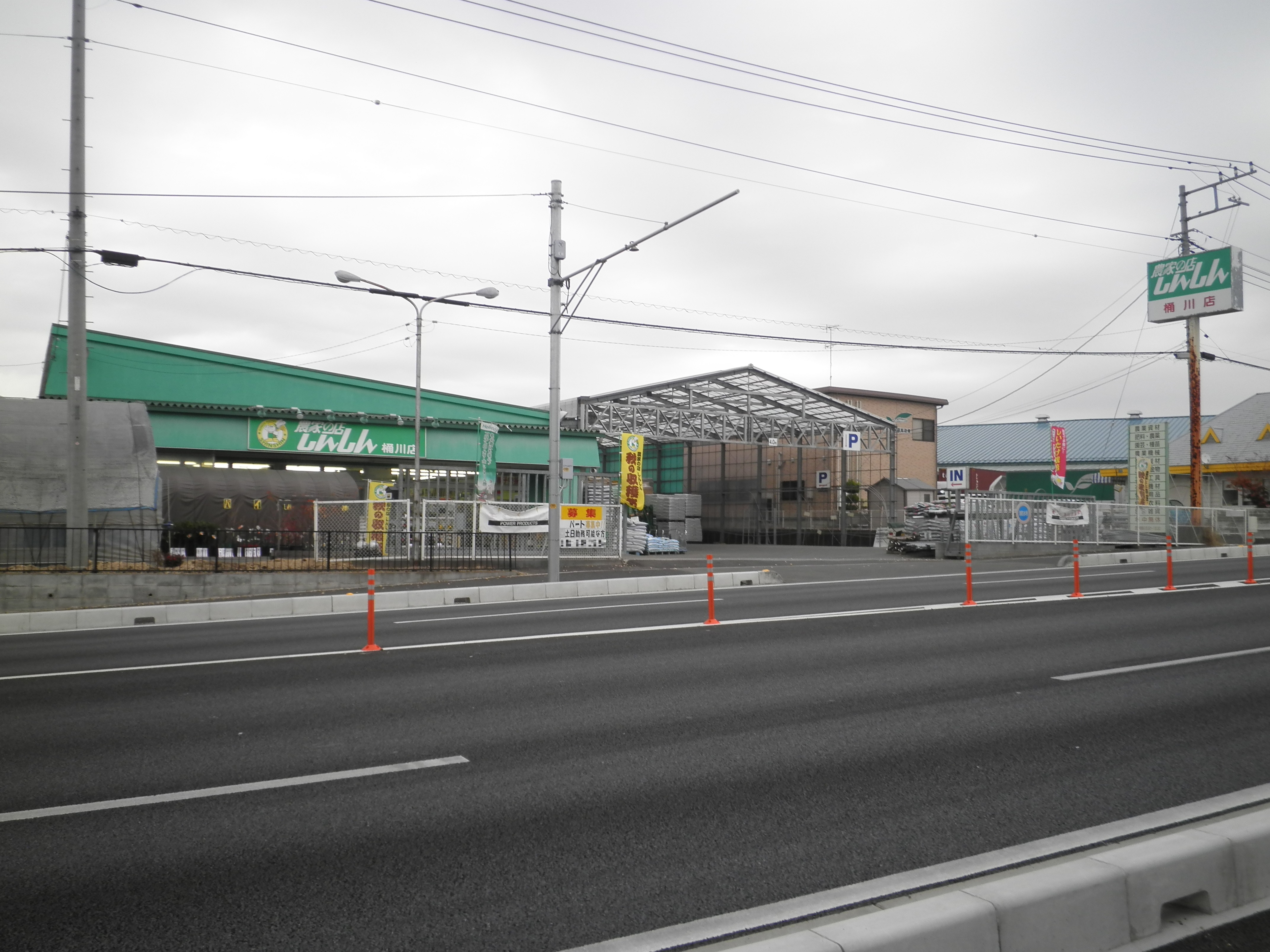 アイアグリ株式会社（伊藤忠商事系列）が運営する農業資材専門店、「農家の店しんしん」の店舗例（FC桶川店）。埼玉県桶川市下日出谷。